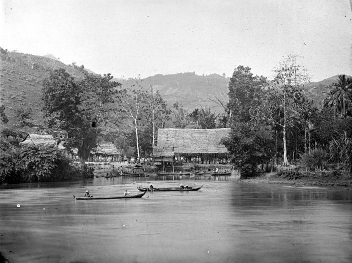 Negatief. Markt Potanga, Manado, Sulawesi